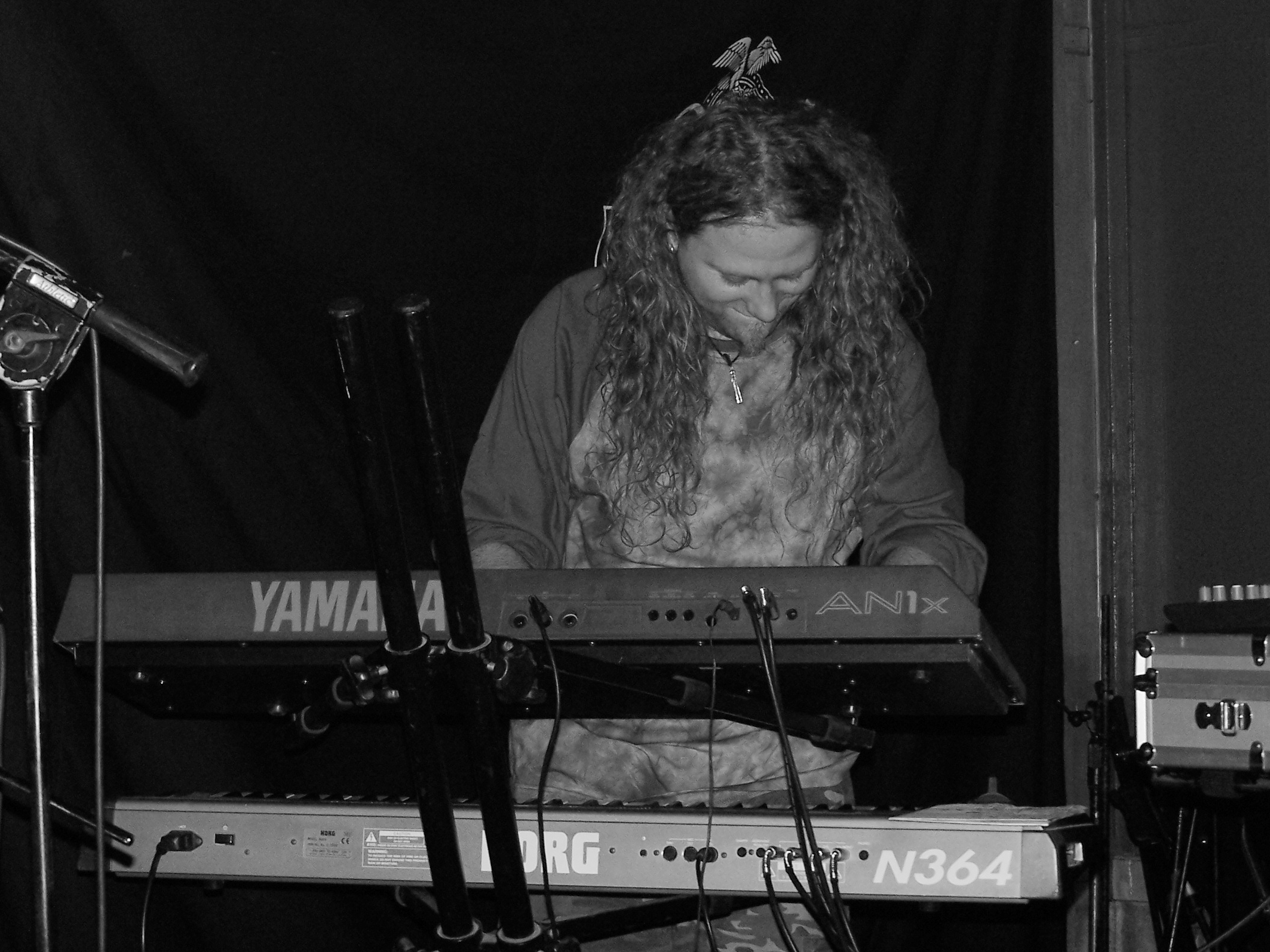 Łukasz "Migdał" Migdalski - klawiszowiec zespołu Artrosis podczas koncertu w katowickim Mega Clubie.